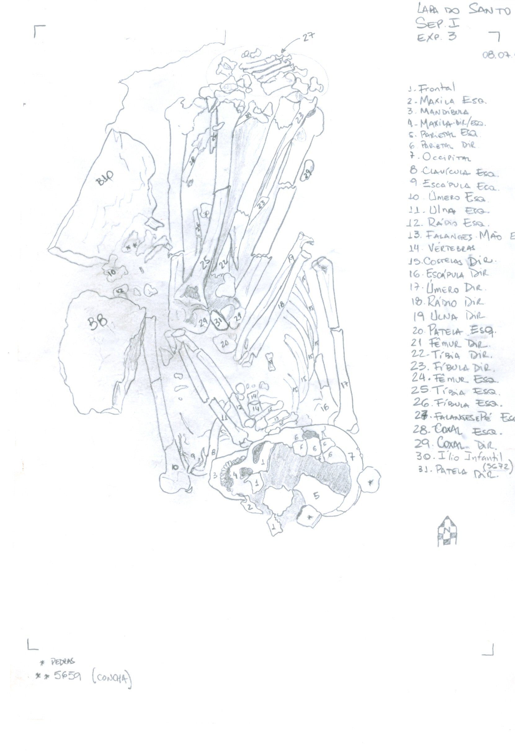 Lapa do Santo - Sepultamento 1 - Croqui manual de escavação da Exposição 3